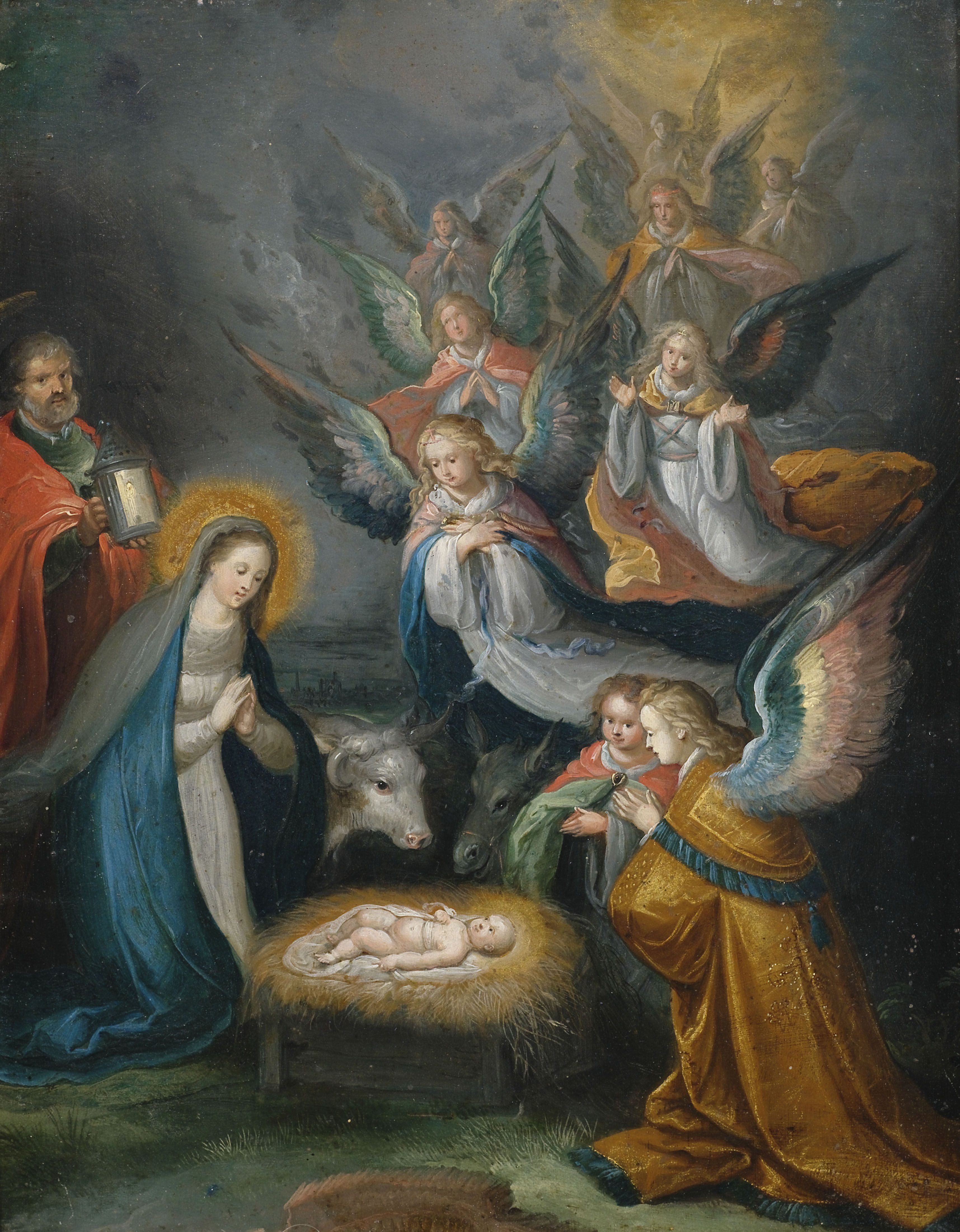 Die Heilige Familie mit Engeln in Anbetung des Kindes. Öl auf Kupfer. 31 x 24 cm.